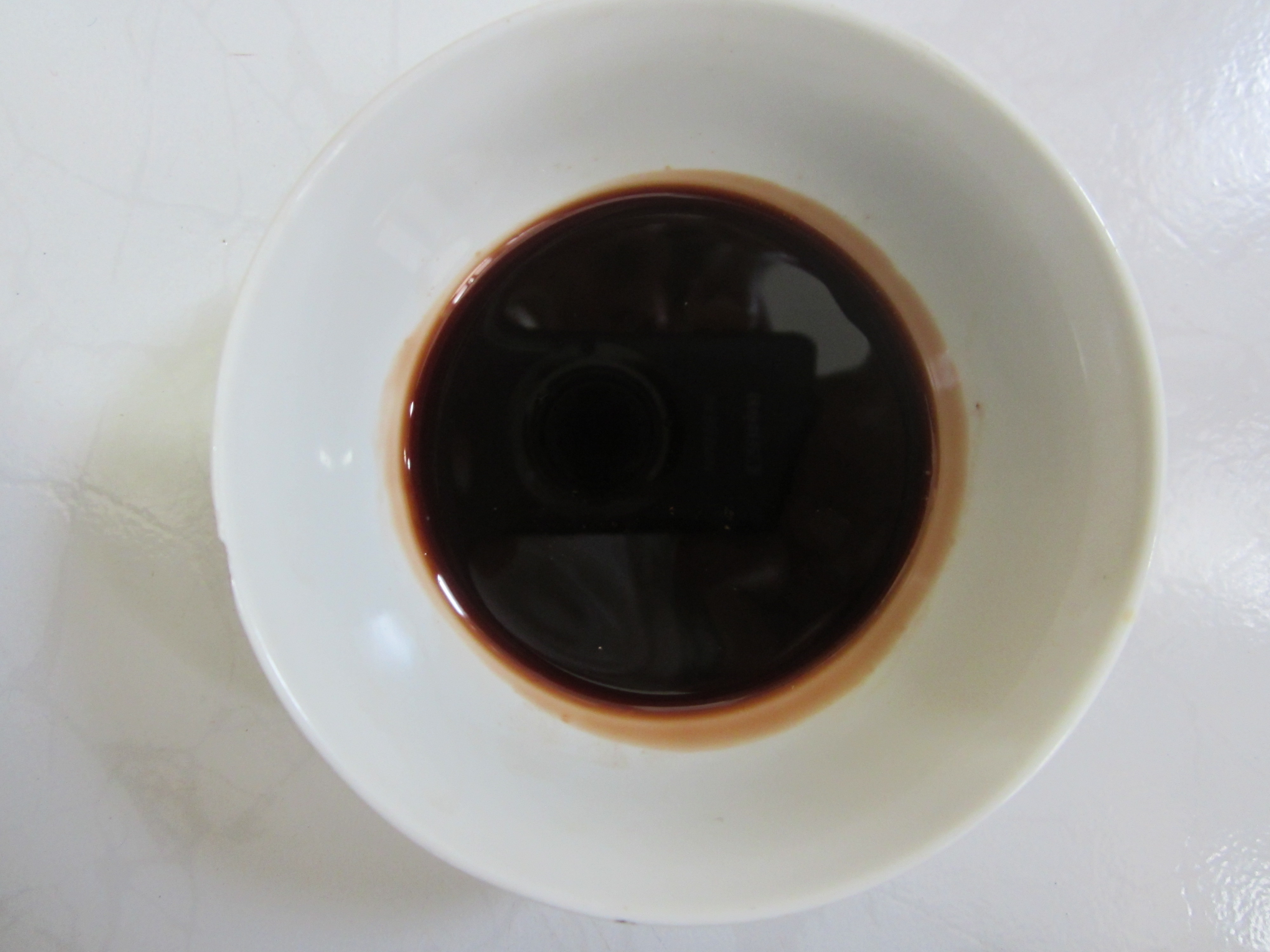 یک عصرانه مازندرانی به نام دشو (شاید بتواند معادل فارسیش را دوشاب یا شیره نامید!) ساخته شده از خرمالومازِرونی: خرمادی دشو